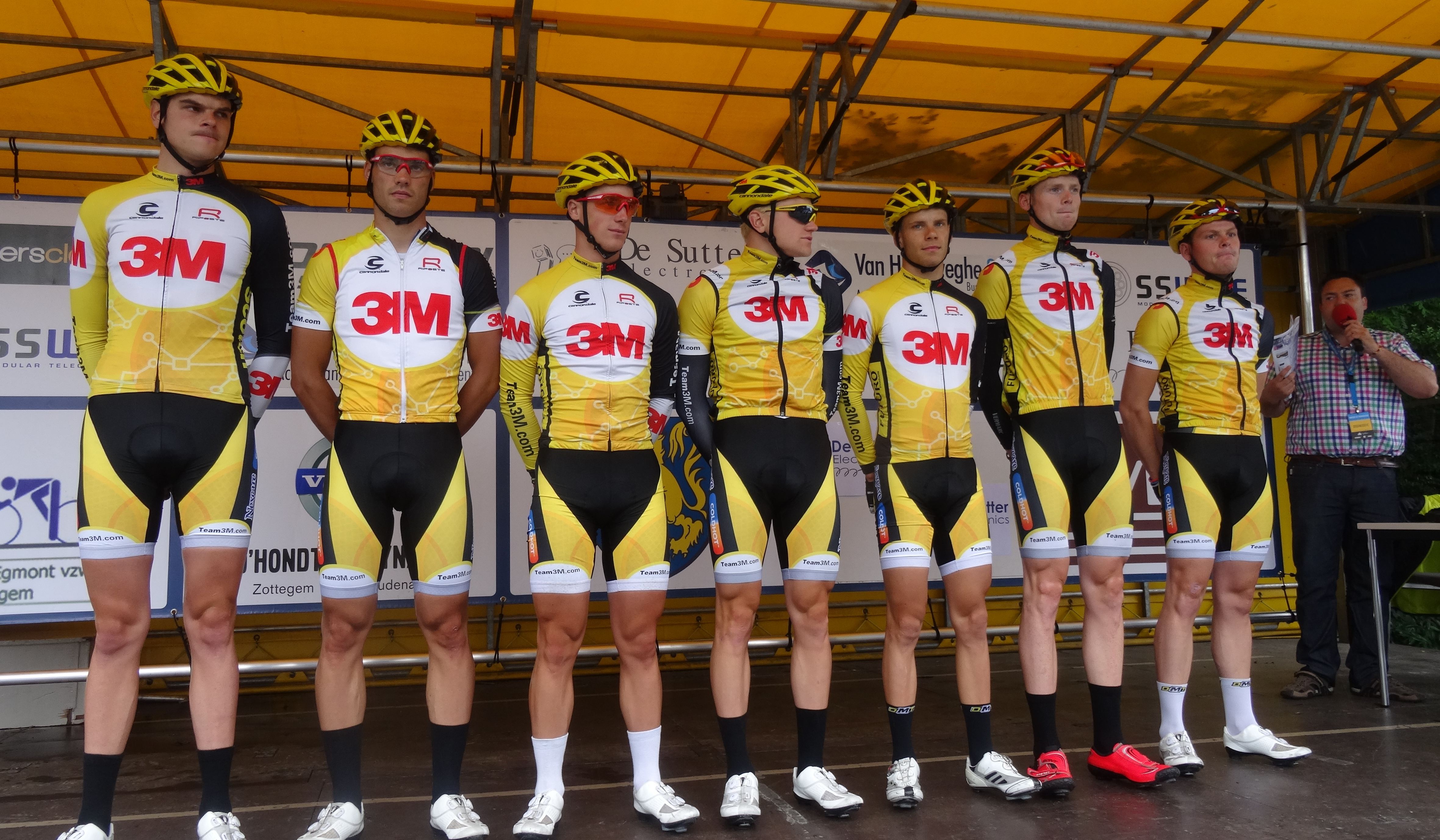 Reportage photographique réalisé le samedi 5 juillet à l'occasion du départ et de l'arrivée du Circuit Het Nieuwsblad espoirs 2014 à Grotenberge (Zottegem), Belgique.